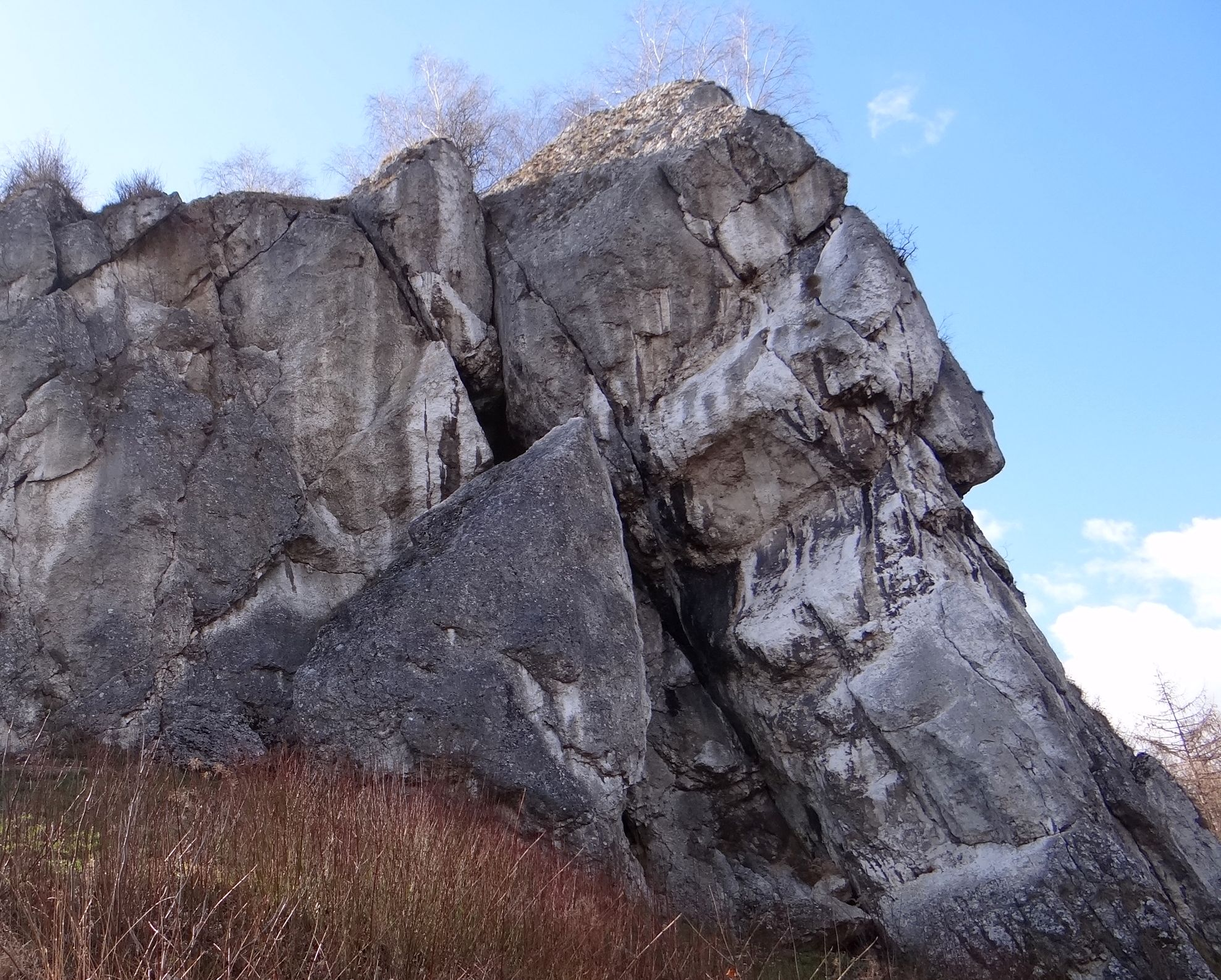 Kula w Dolinie Kobylańskiej